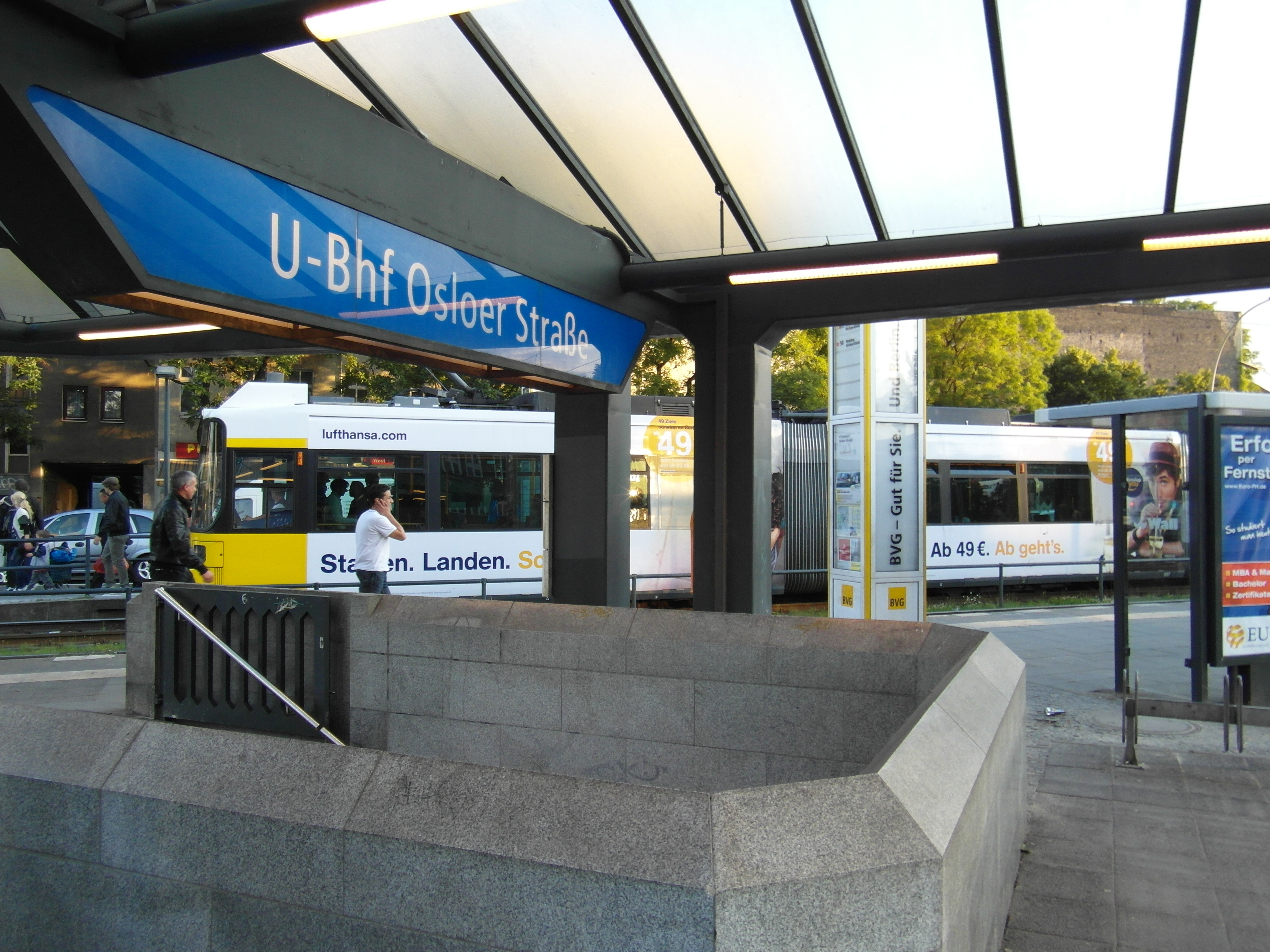 Zugänge zum Bahnhof und Haltestelle der Straßenbahn